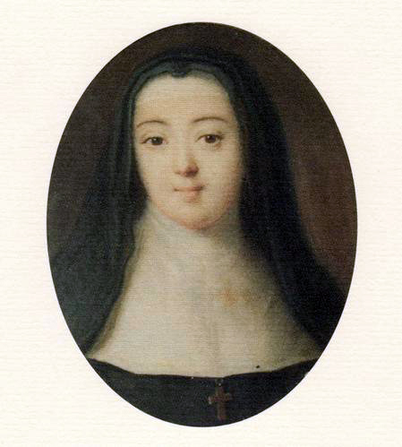 Chanoinesse séculière chez les bénédictines, jeune belle-sœur de dix-neuf ans du marquis de Sade avec lequel elle aura une liaison violente et passionnée